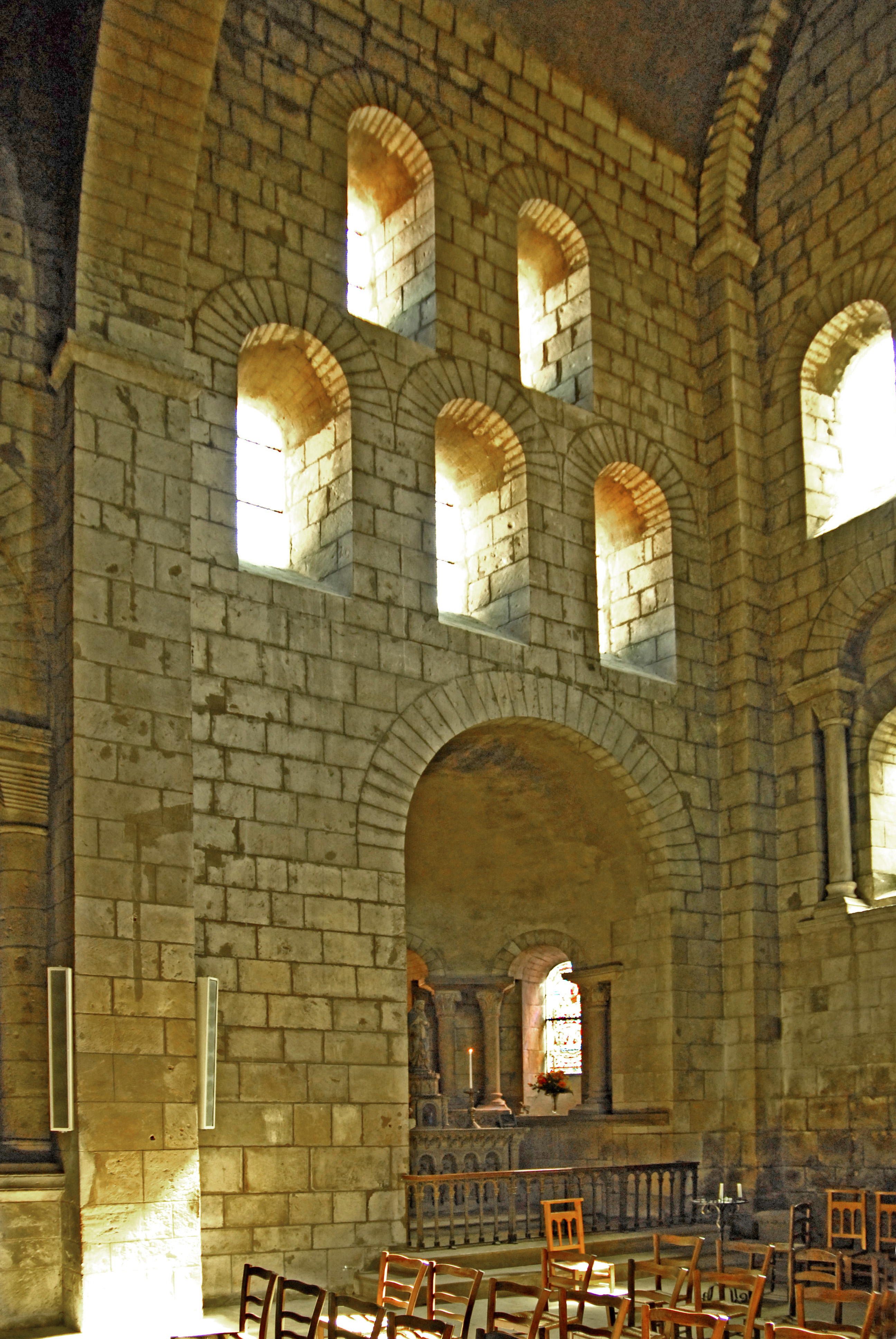 St.-Etienne Nevers, südl. Querhausarm